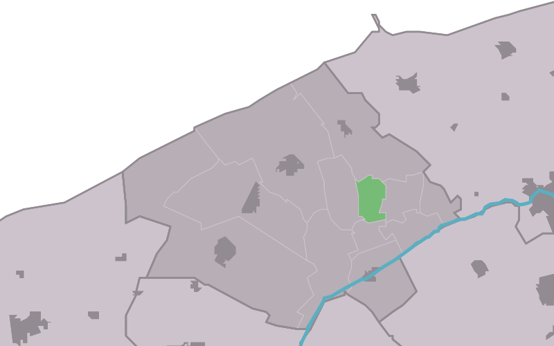 Kaartsje fan himrik fan Ginnum